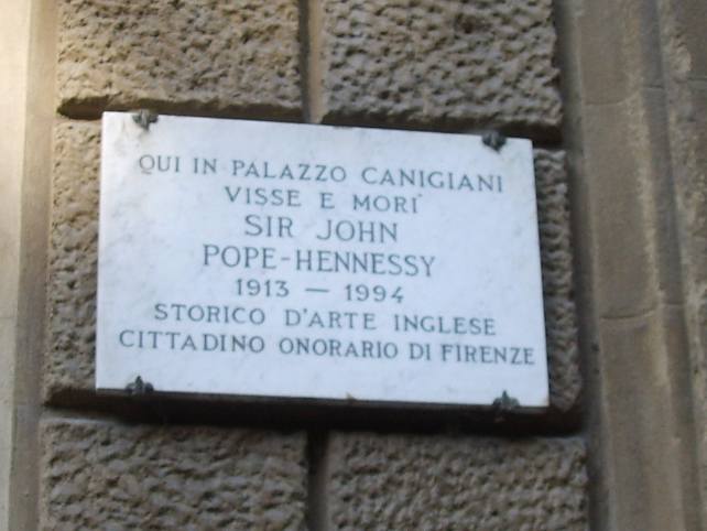 Palazzo Canigiani or Bardi-Larioni or degli Ilarioni